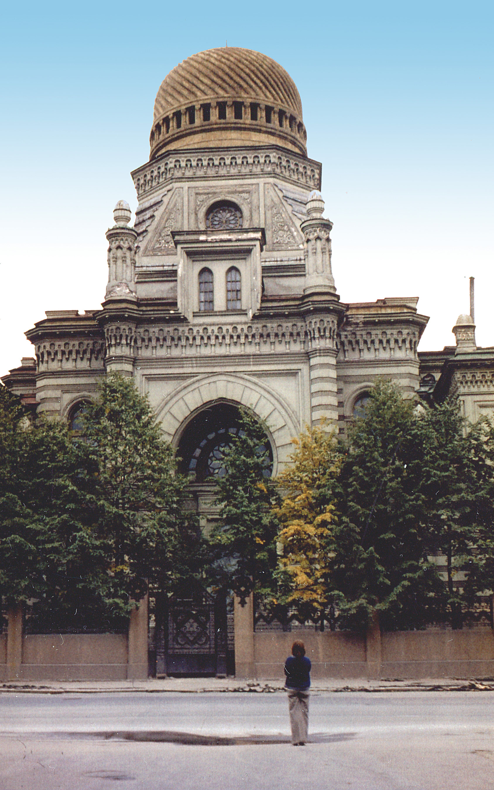 Большая хоральная синагога